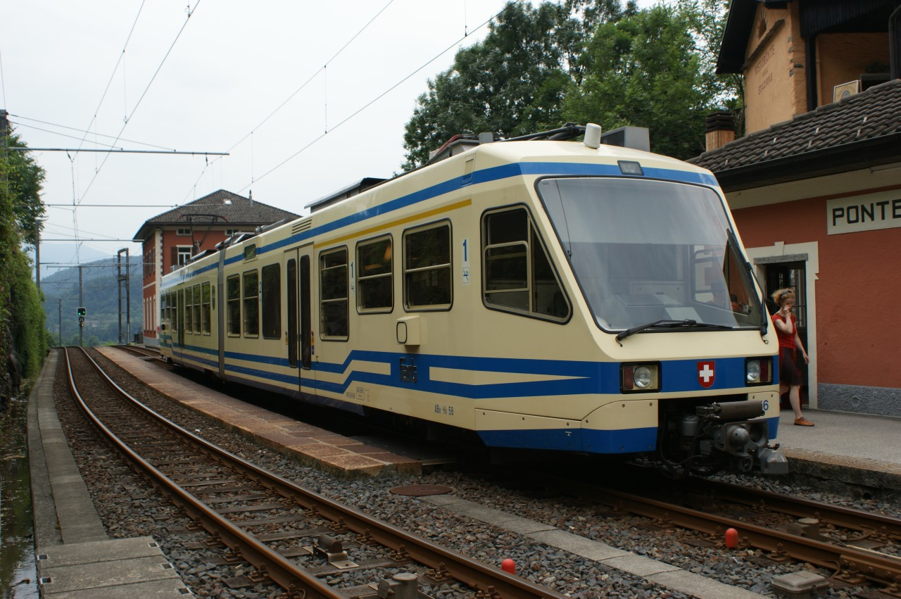 FART ABe 4/6 56 in Ponte Brolla. Im Vordergrund sind die Integra-Magnete der Zugsicherung ZST-90 zu sehen